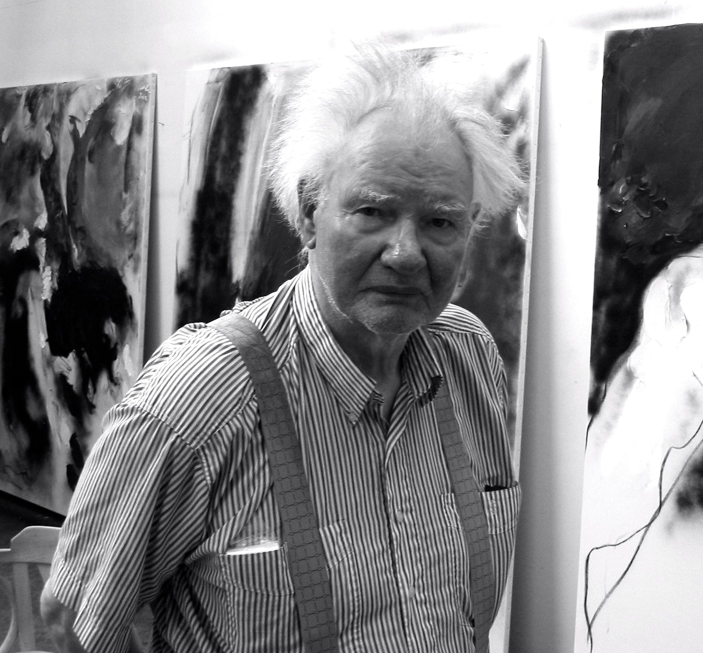 Ger Lataster in zijn atelier